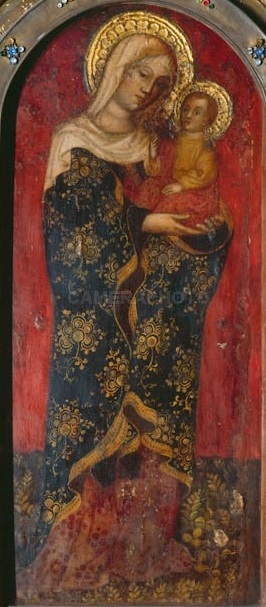 Venezia, Chiesa di Santa Maria dei Miracoli, immagine della Madonna al di sopra del altare centrale